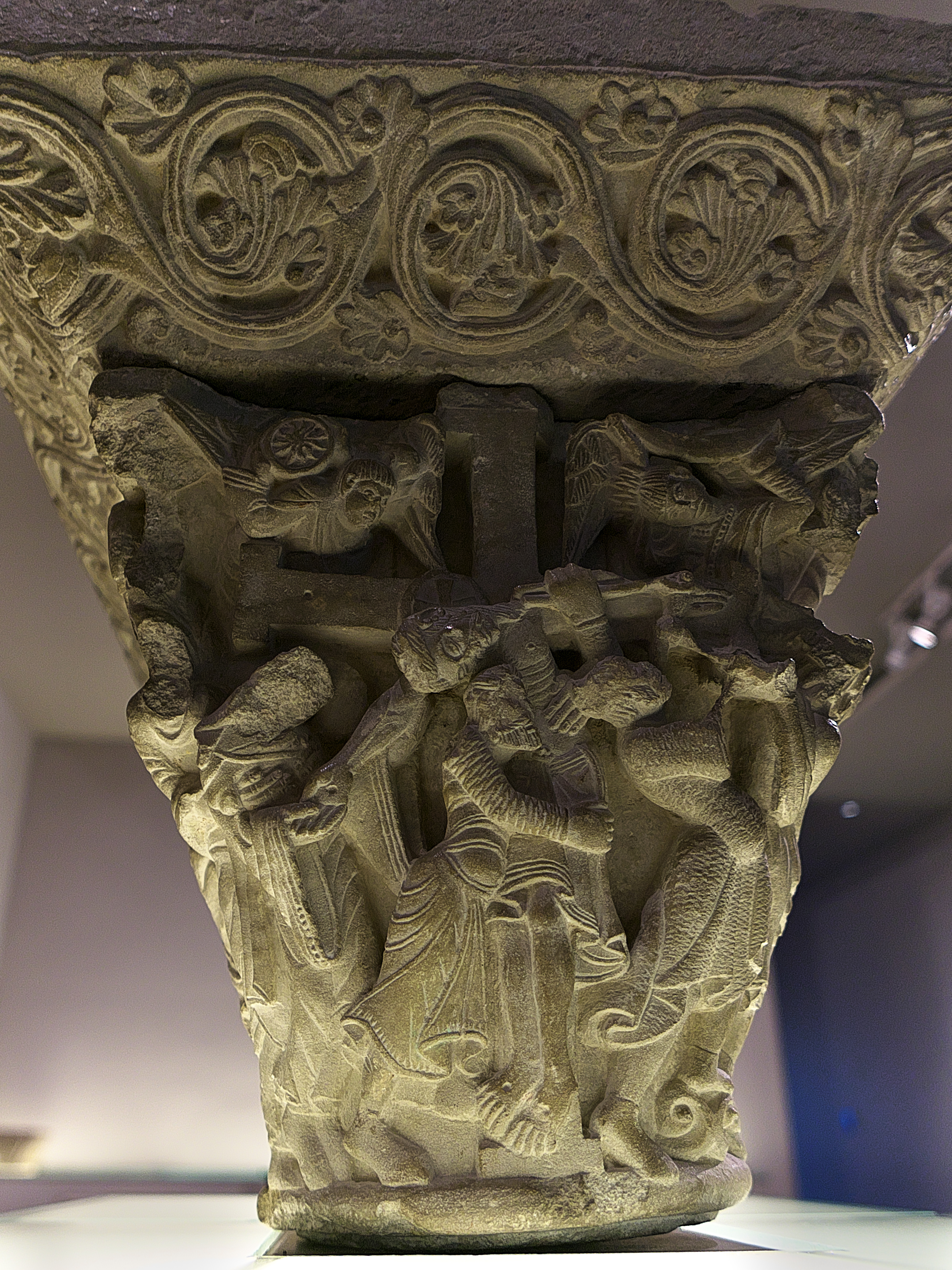 Capitel (1140-1150) procedente del claustro románico de la Catedral de Pamplona.